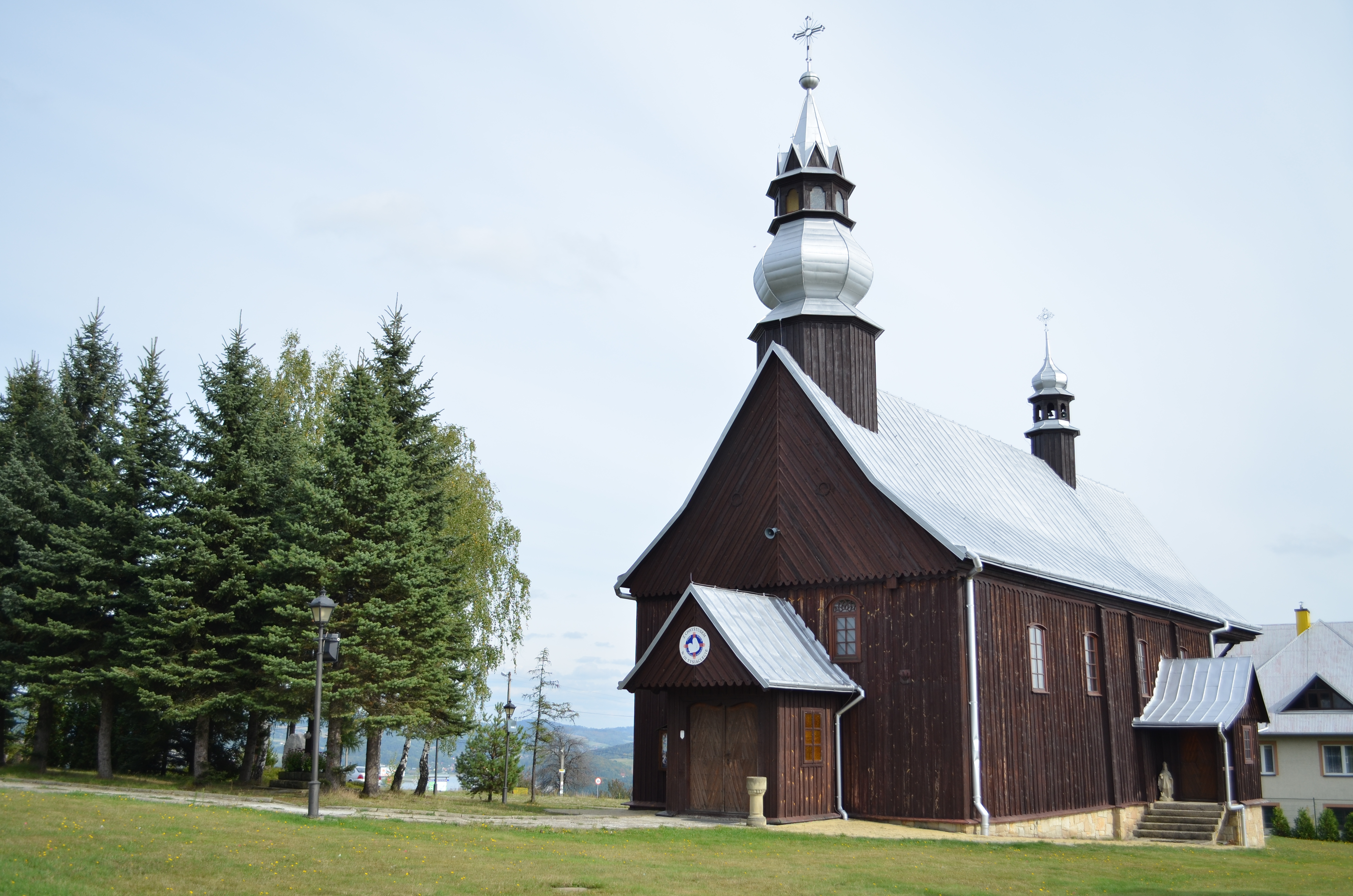 Tabaszowa. Zespół kościoła pw. św. Mikołaja Biskupa.